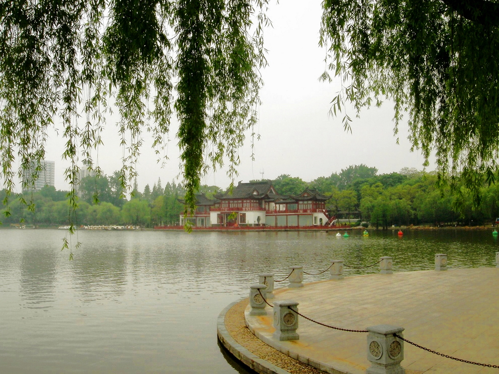 莫愁湖抱月楼